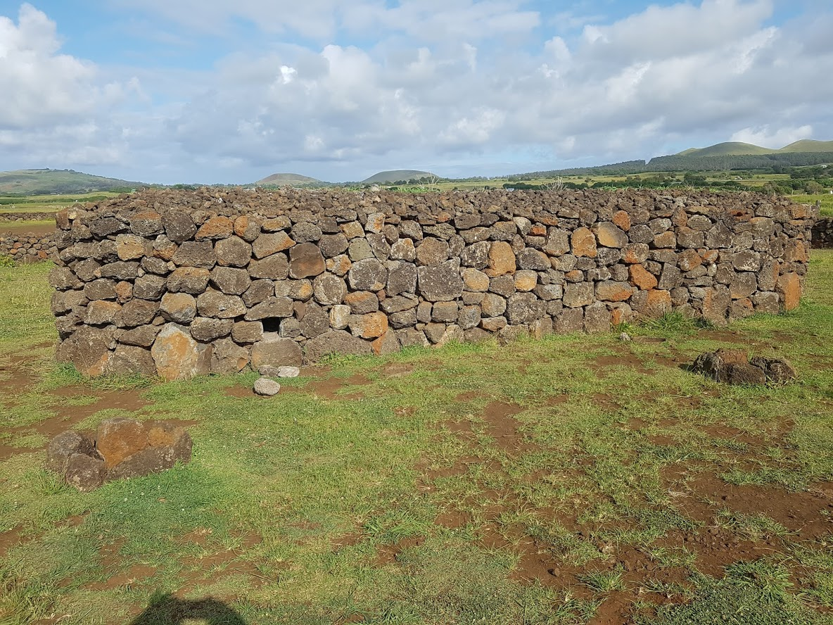 לול תרנגולות משוחזר באי הפסחא